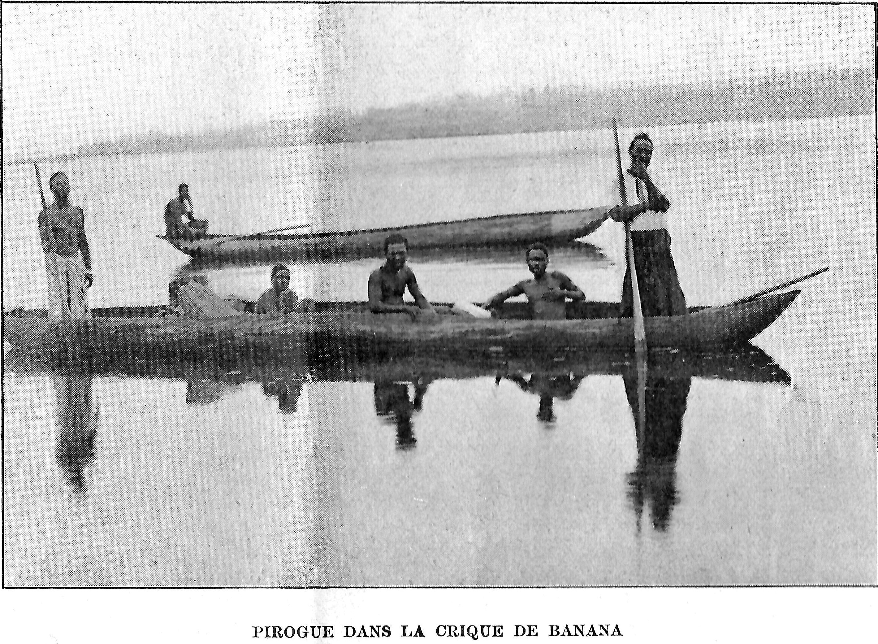 Pirogue dans la crique de Banana — Bas, Congo de Belgique.